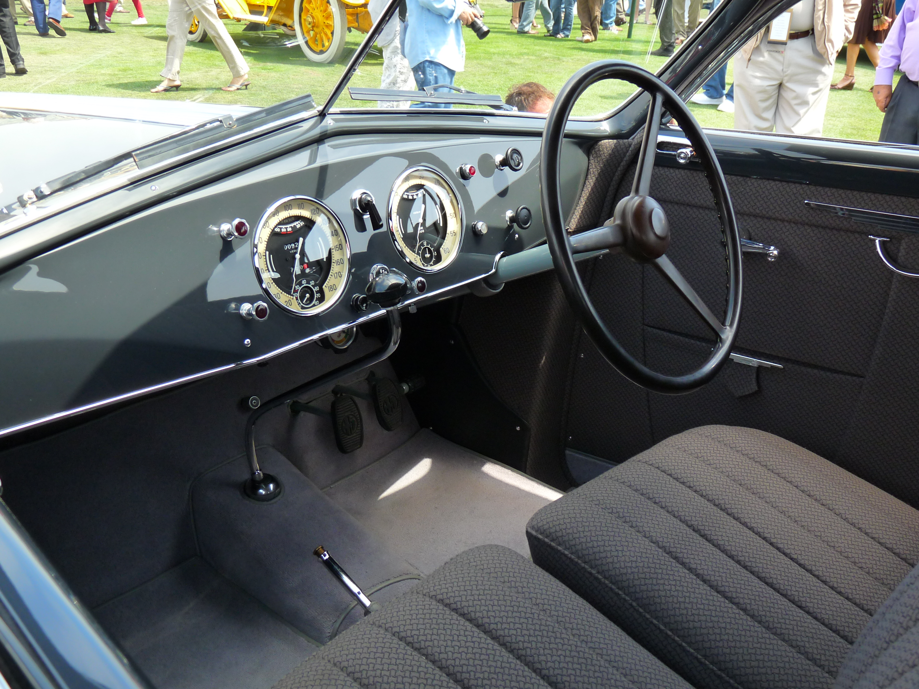 1937 Alfa Romeo 6C 2300B Pescara Berlinetta